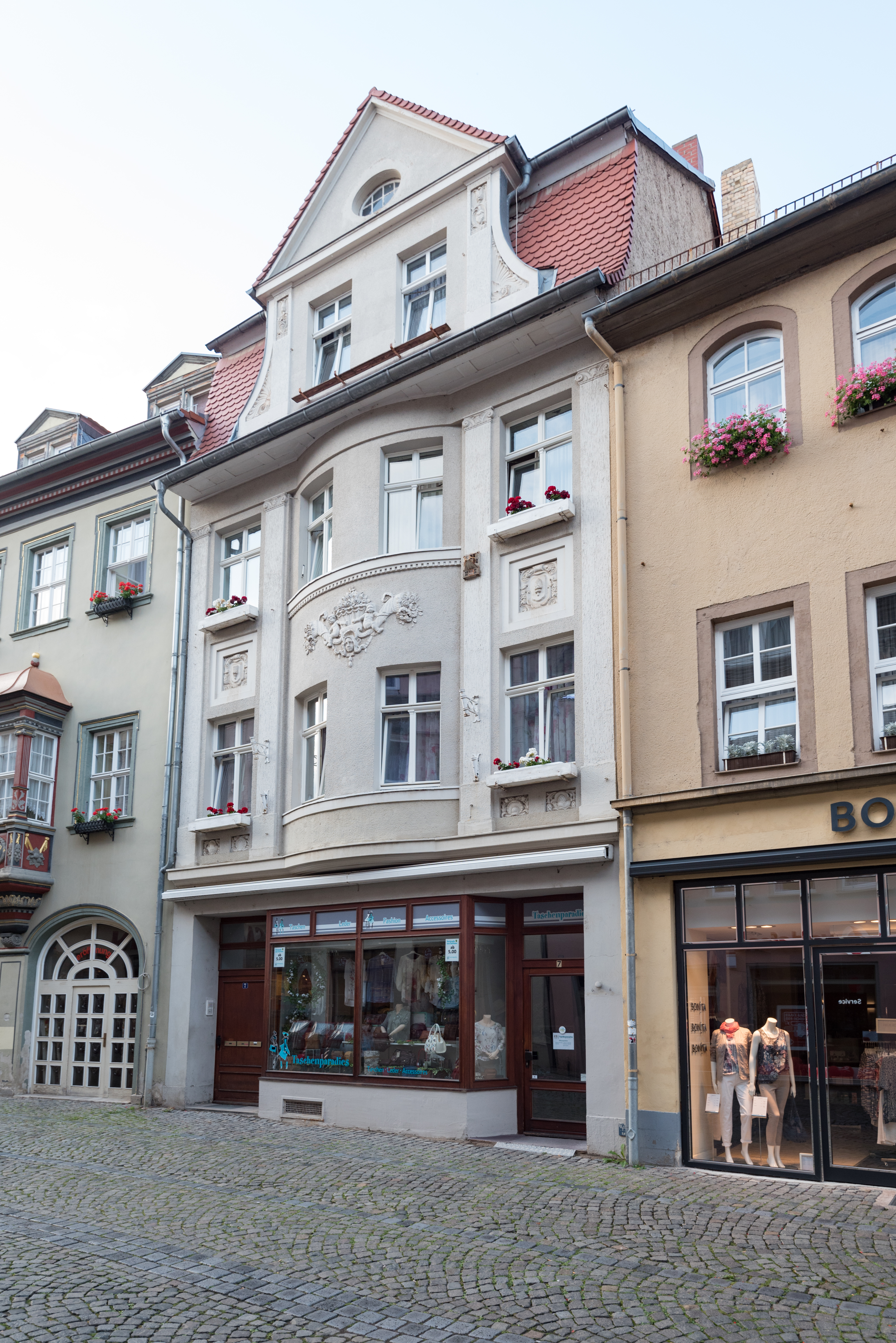 Naumburg (Saale), Herrenstraße 7